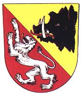 znak města Blatná zdroj